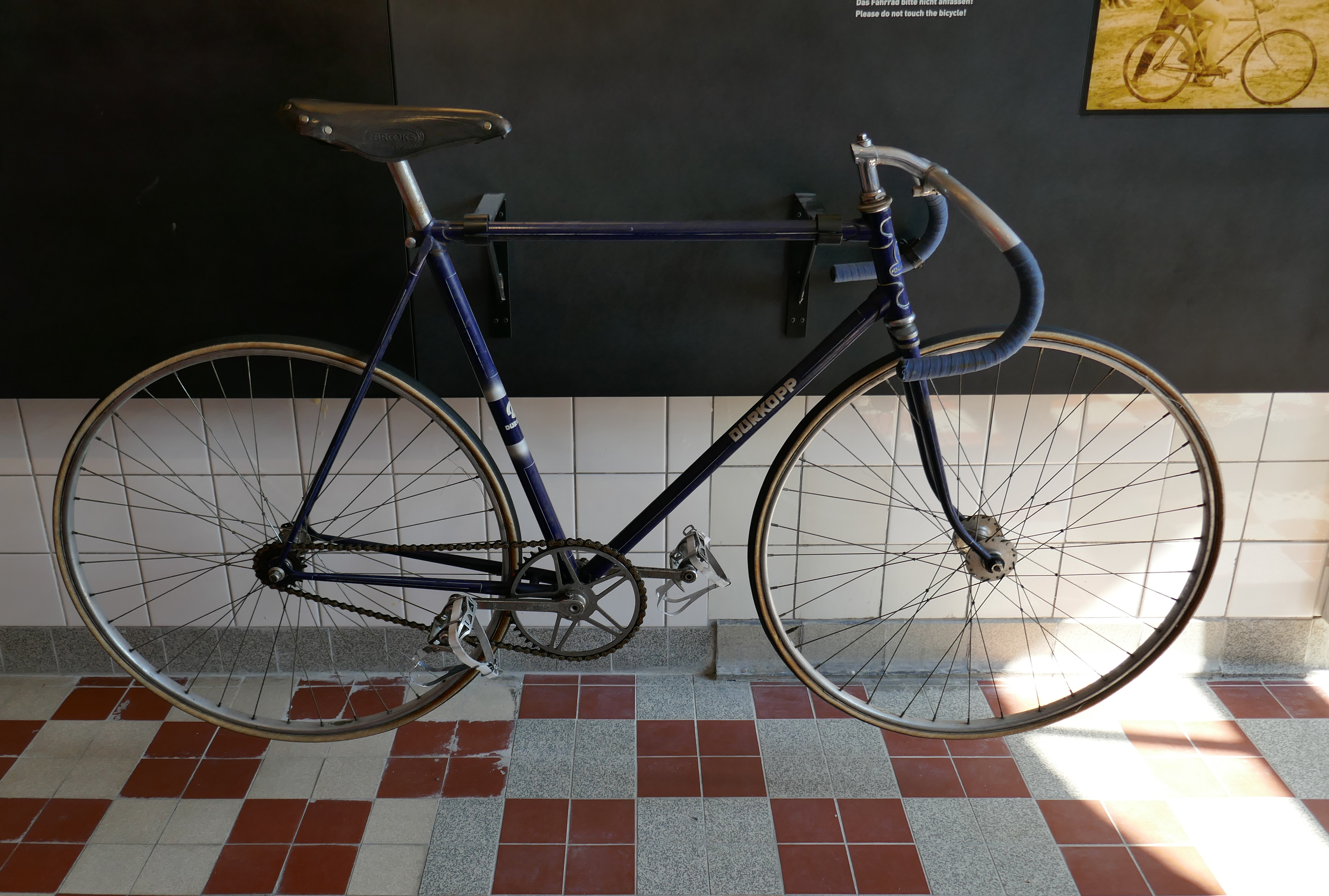 Wikipedia Stammtisch Ruhrgebiet, Zeche Zollern. Verwaltungsgebäude - Ausstellung - Bahnrennrad der Firma Dürkopp, 1930er Jahre.